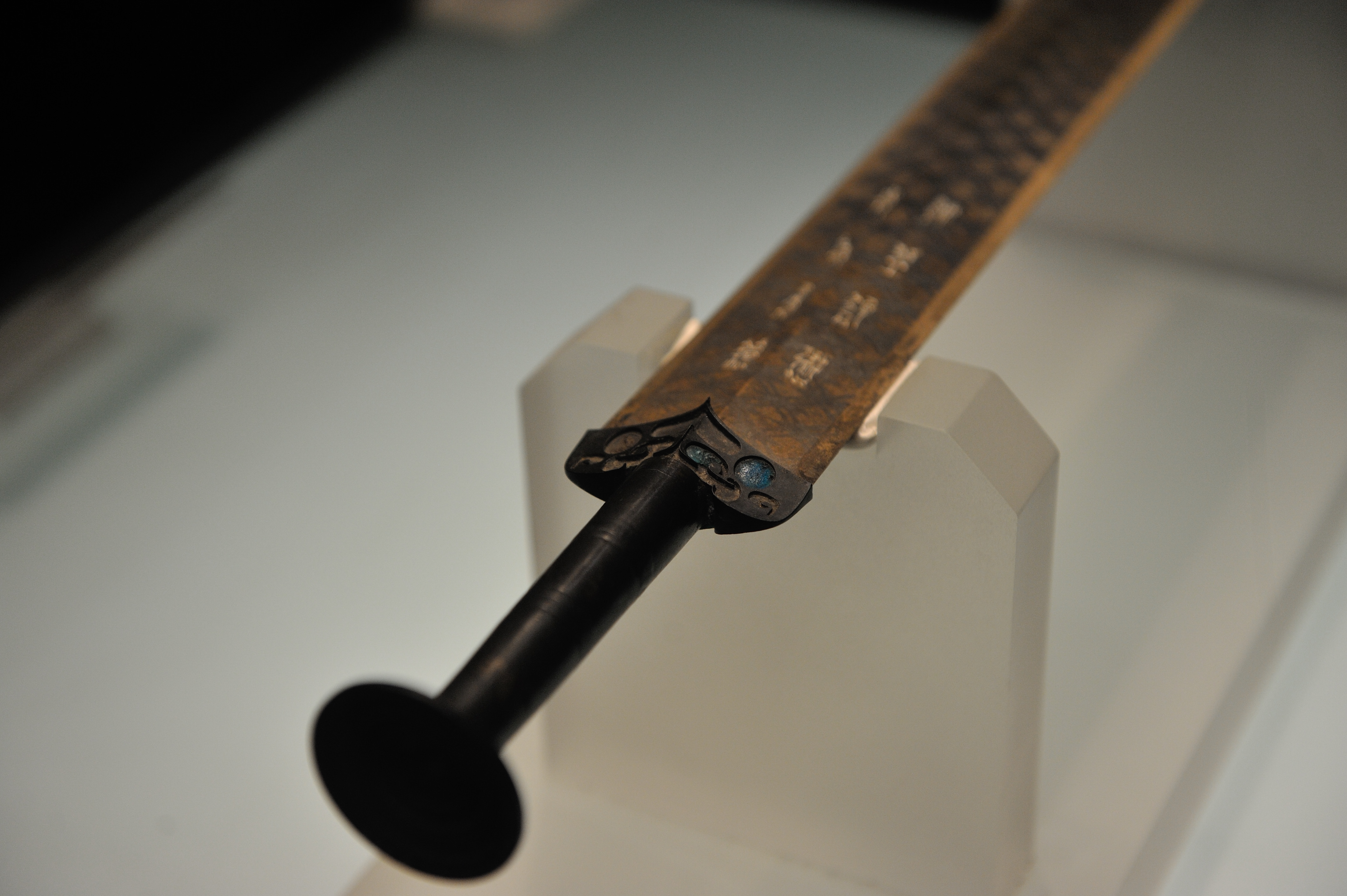 越王勾践剑，湖北省博物馆